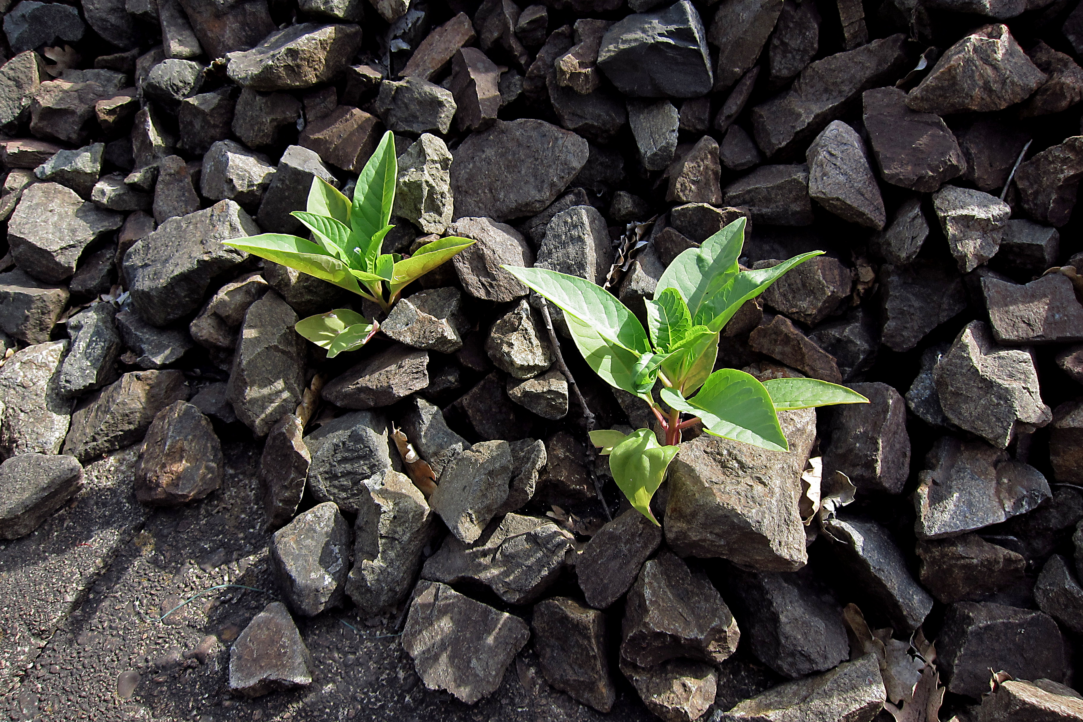 Toulouse (Haute-Garonne, Midi-Pyrénées, France) : Phytolaques (Phytolacca americana) dans le ballast.